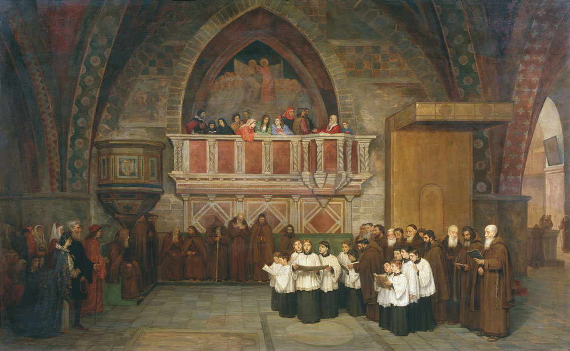 М.П. Боткин. Вечерня в церкви Святого Франциска в Ассизи. 1871 год Холст, масло. 111 x 176 см. Государственная Третьяковская галерея